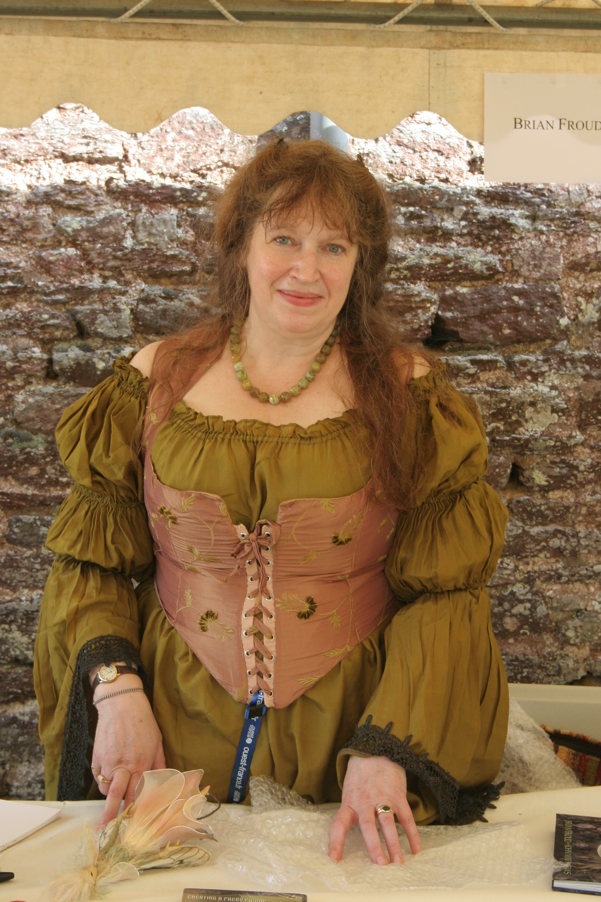 Wendy Froud au château de Comper lors des Rencontres de l’imaginaire de Brocéliande de 2014.